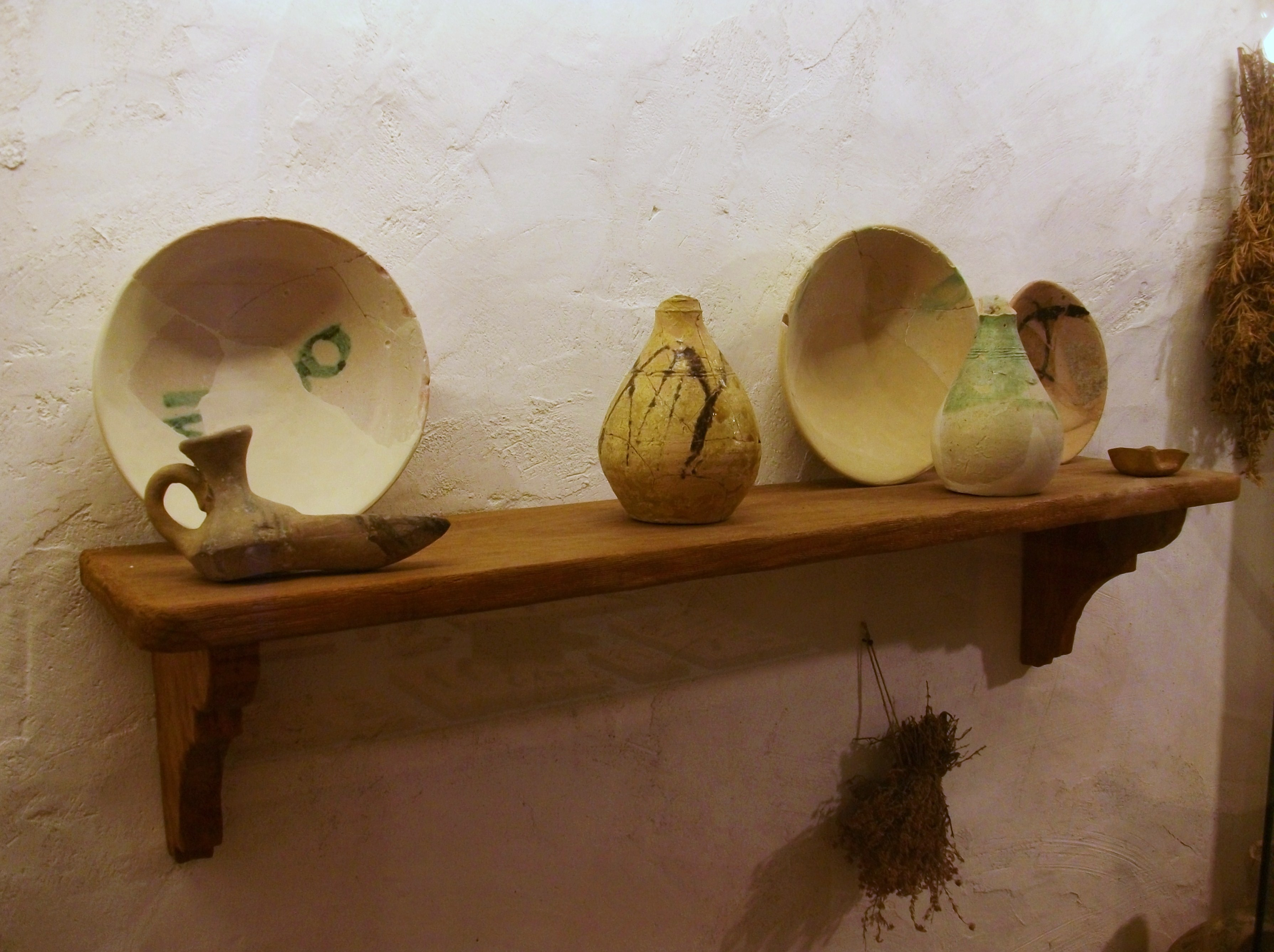 Atifells de cuina andalusins, Museu Arqueològic Municipal d'Alcoi.